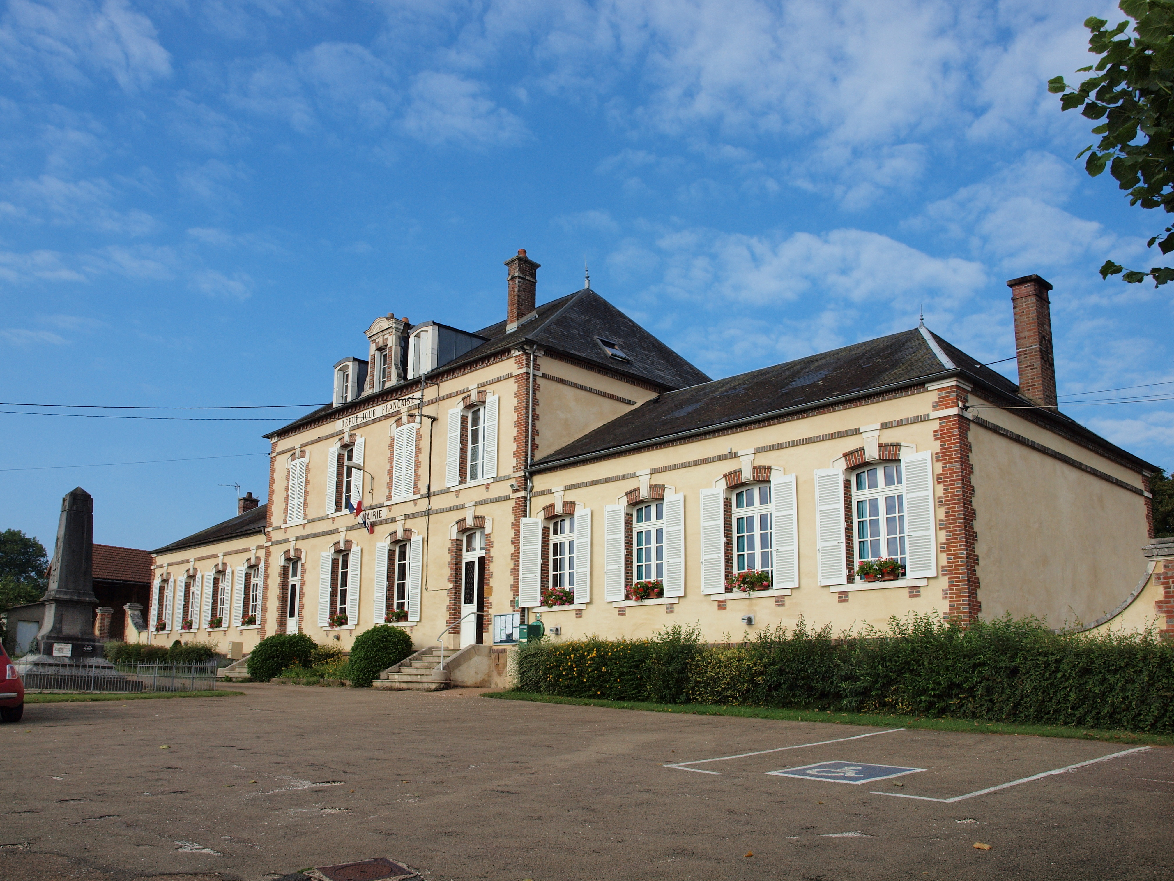 Mairie-école de Fontaines (Yonne, France)